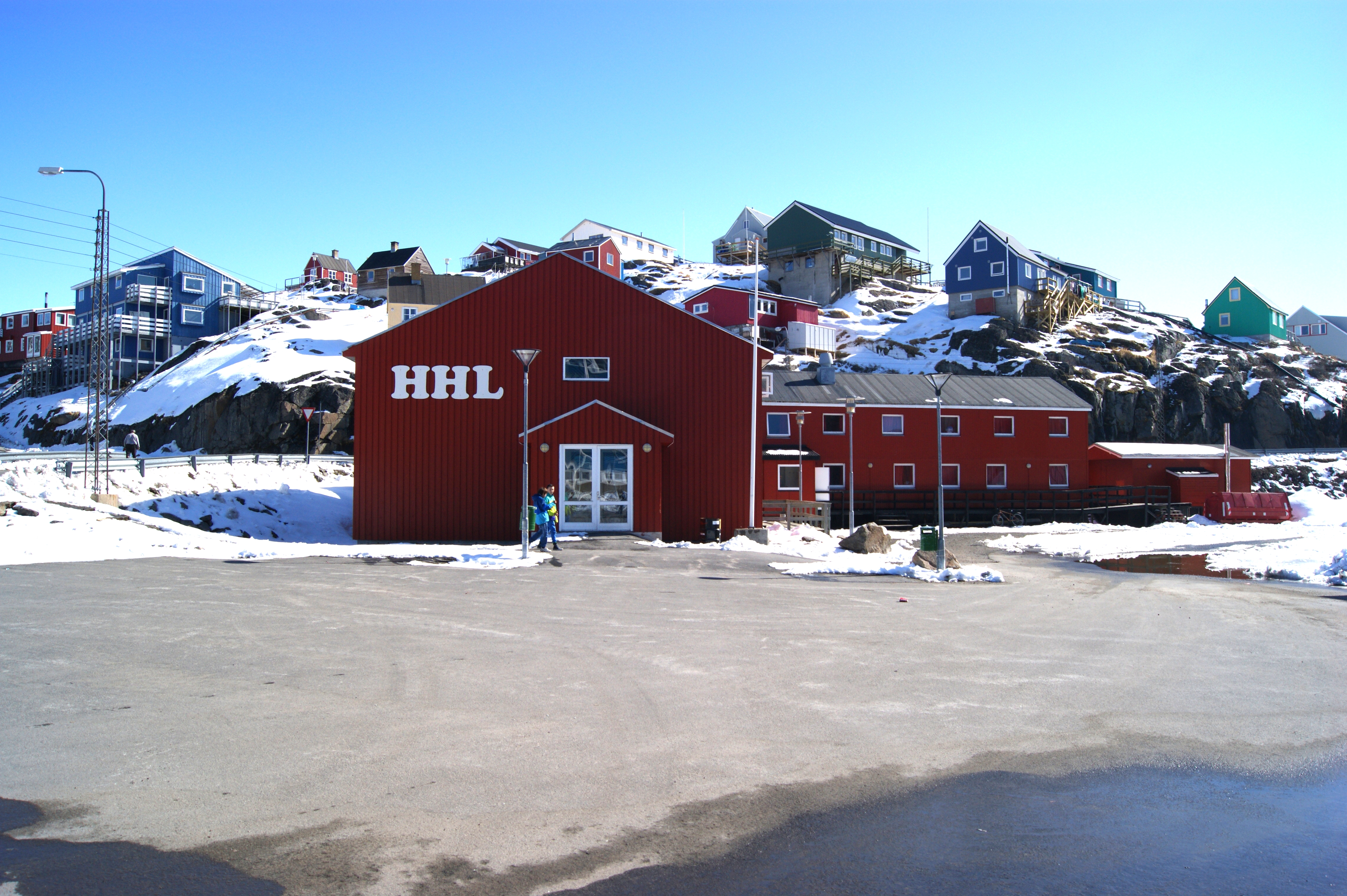 מראה בעיירה מניטסוק, גרינלנד